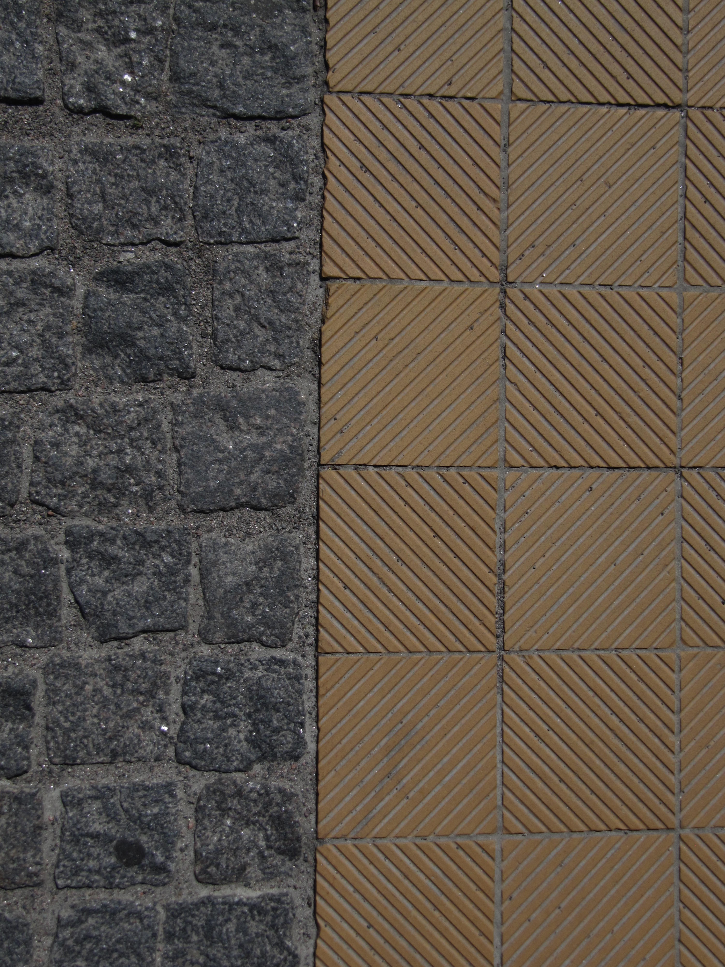 Fortov i Rønne, Bornholm: t.v. brosten af Rønne Granit, t.h. Hasle klinker